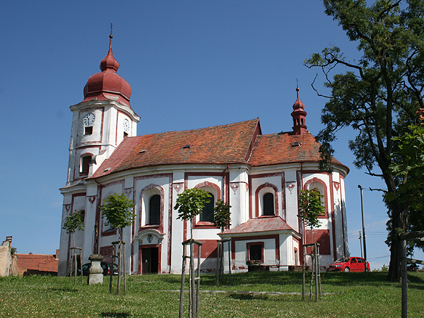 Kostel svatého Petra a Pavla v Líšťanech, okres Plzeň-sever, Plzeňský kraj, Česká republika